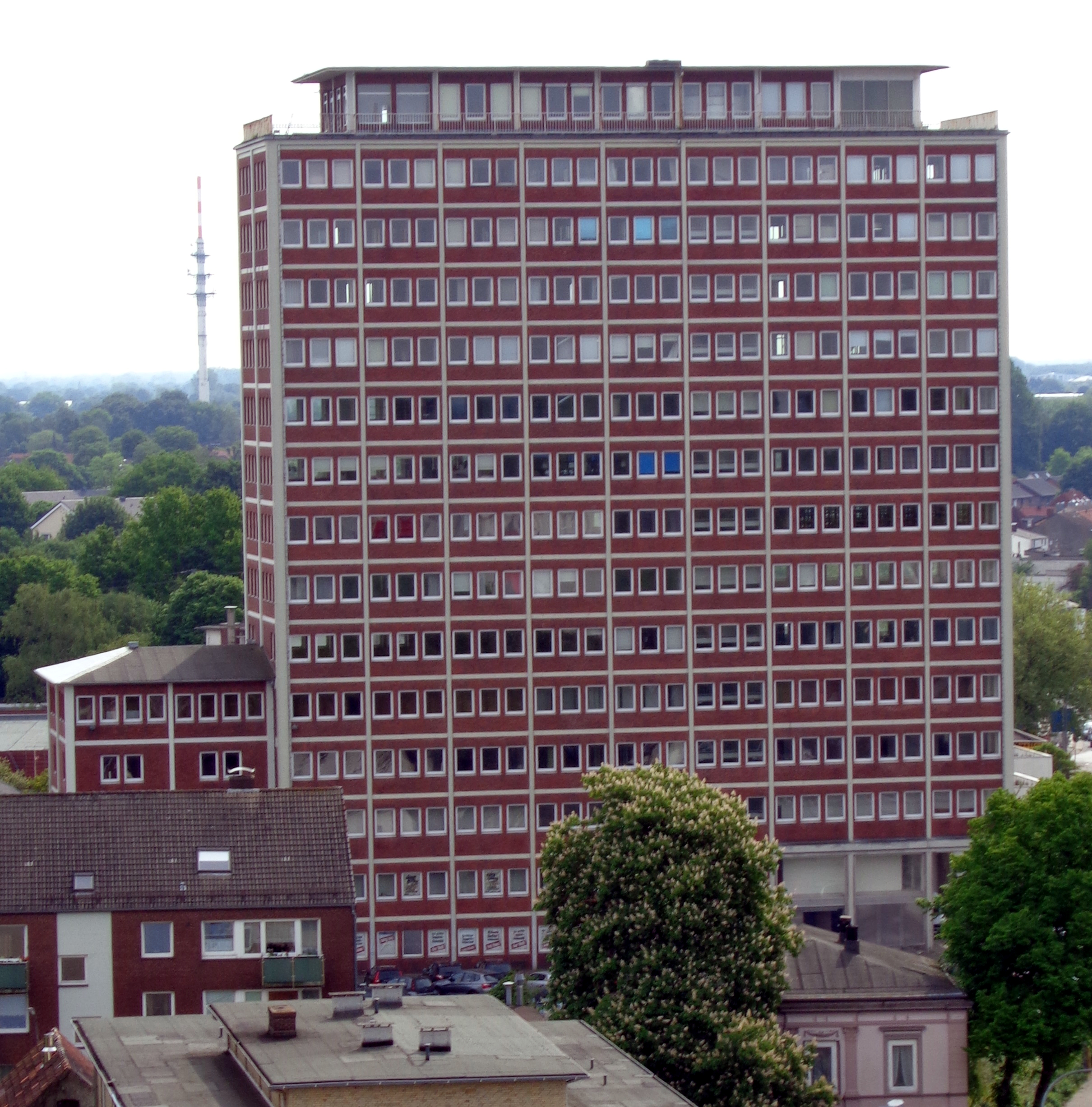 Ehemaliges Verwaltungsgebäude der Teppich-Kibek GmbH in Elmshorn, vom Dach des Verwaltungsgebäudes der Peter Kölln KGaA